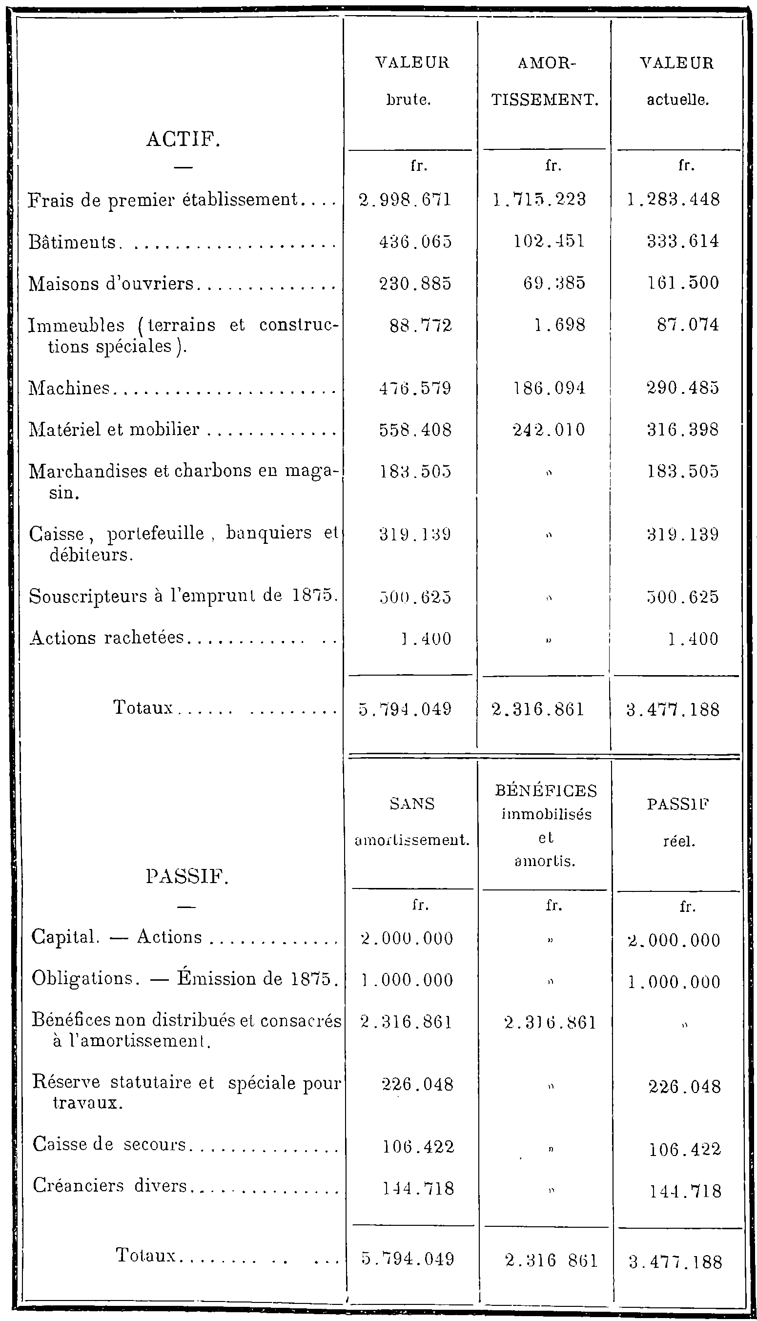 Bilan de la Compagnie des mines de Meurchin au 30 avril 1879.